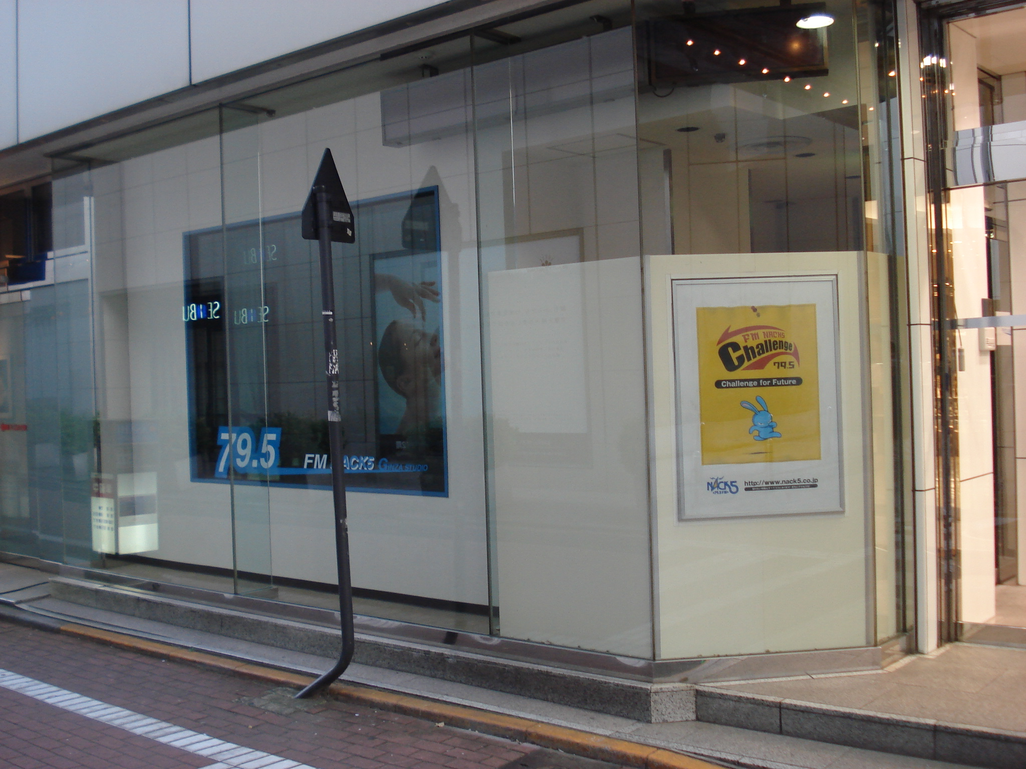 エフエムナックファイブ 銀座サテライトスタジオ 東京都中央区銀座四丁目地先、西銀座デパート1階